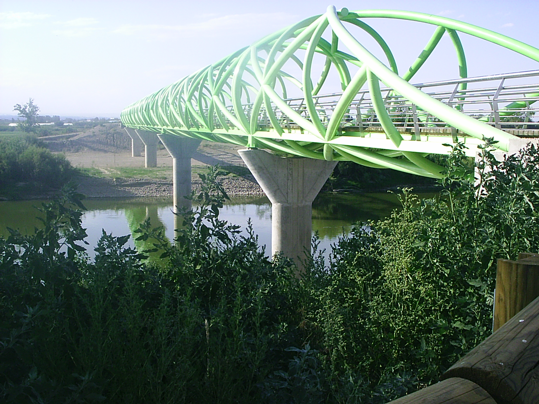 Pasarela del Bicentenario